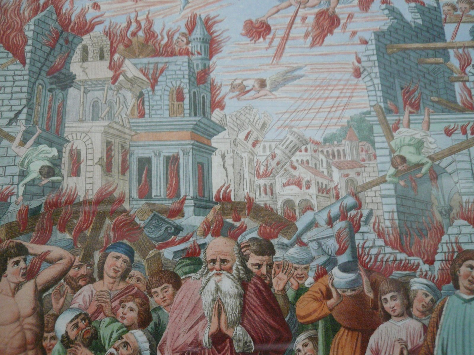 Dettaglio da: La distruzione di Sodoma di Benozzo Gozzoli, già nel Camposanto di Pisa. Incisione acquarellata. L'affresco è stato rovinato in modo irreparabile da un bombardamento durante la Seconda guerra mondiale, questa riproduzione serve a darci un'idea di quel che fosse prima dei danni.